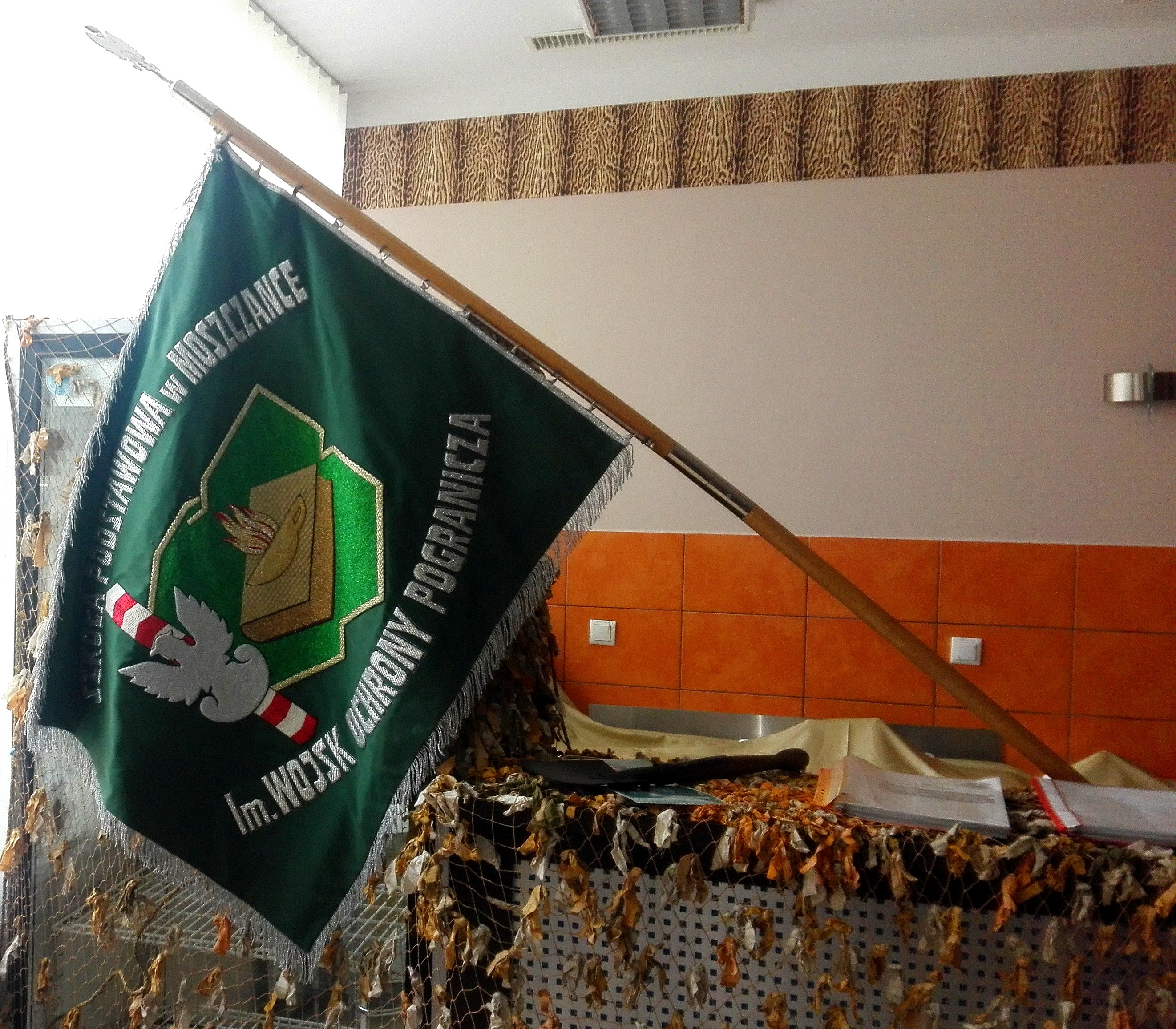 Sztandar Szkoły Podstawowej imienia Wojsk Ochrony Pogranicza w Moszczance – Wystawa „Historia batalionu prudnickiego“ (Schronisko Młodzieżowe „Dąbrówka“ w Prudniku)